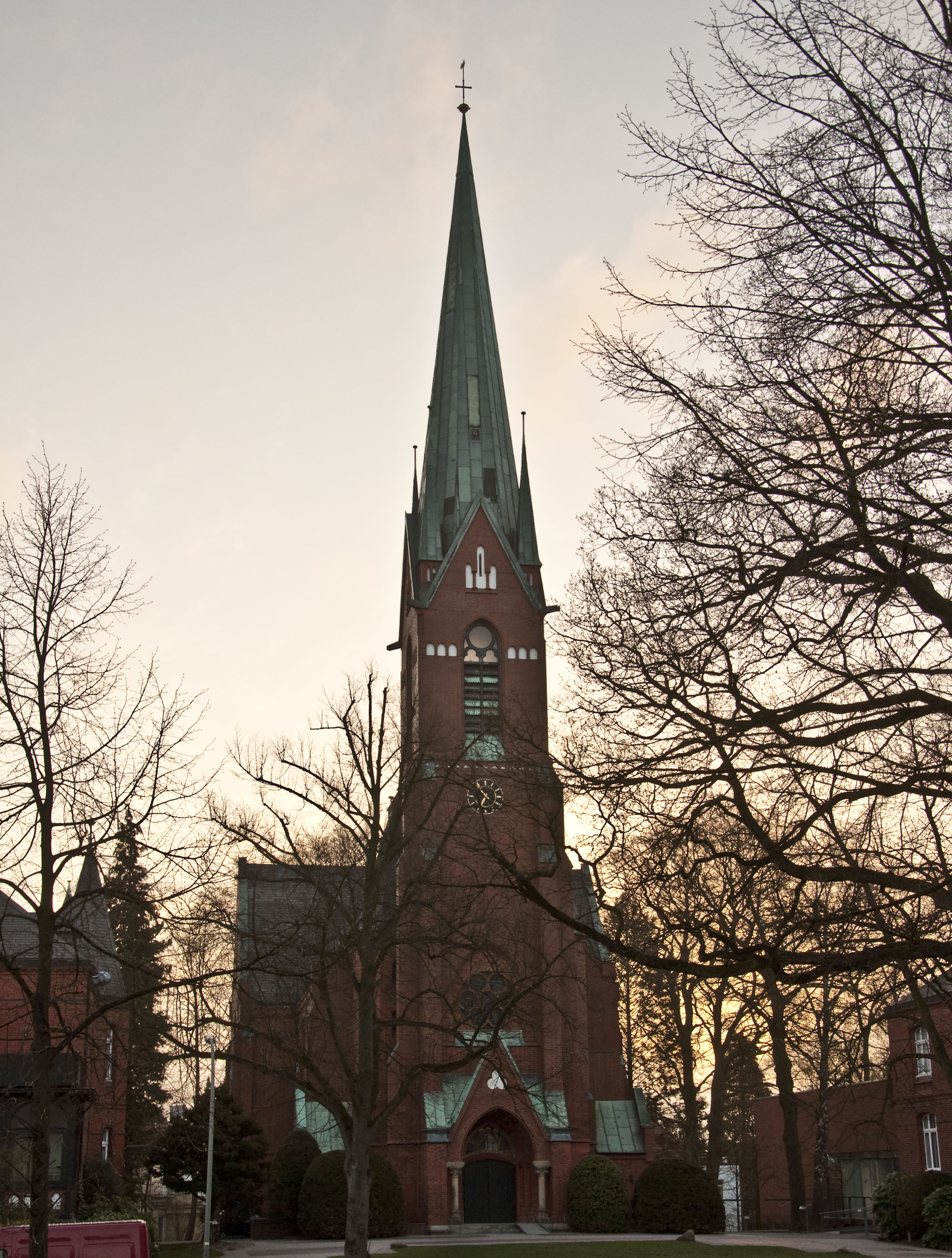 Kirche der Ev.-luth. Kirchengemeinde Blankenese in Hamburg.